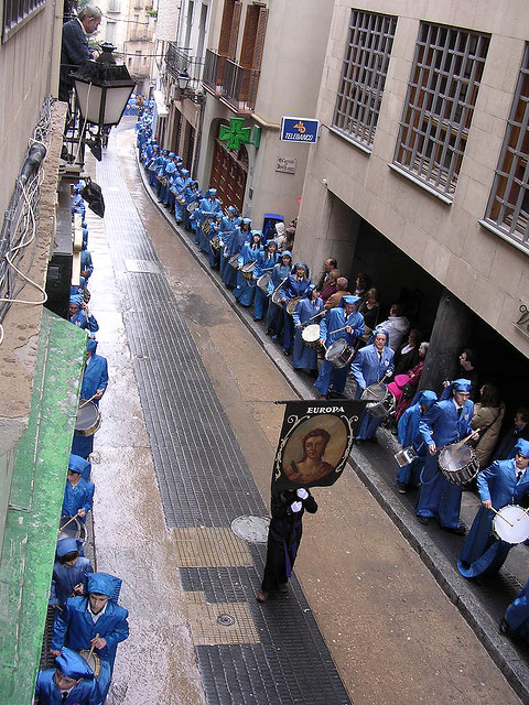 Procesión del Pregón. Cofradía del Santo Entierro. Viernes Santo en Alcañiz